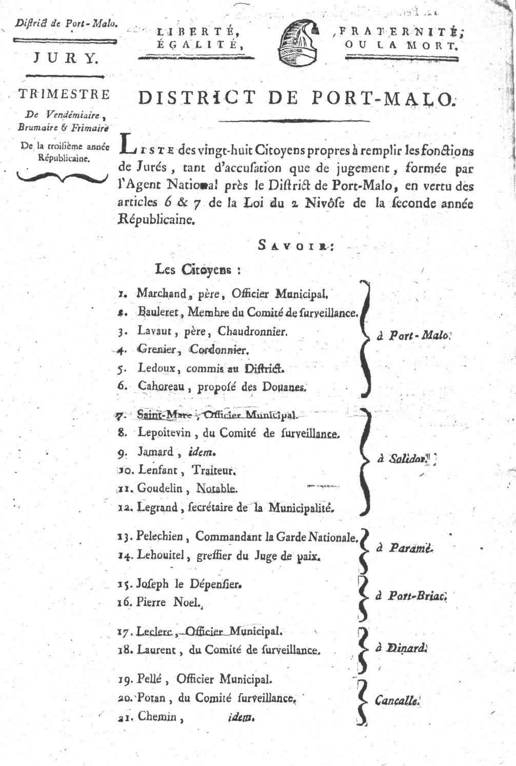 Liste des 28 citoyens jurés du Tribunal de district de Saint Malo pour le premier trimestre de l'an III. Les sept autres sont au verso de l'original. Articles 6 et 7 de la loi du 2 nivôse an II. Format : A4.